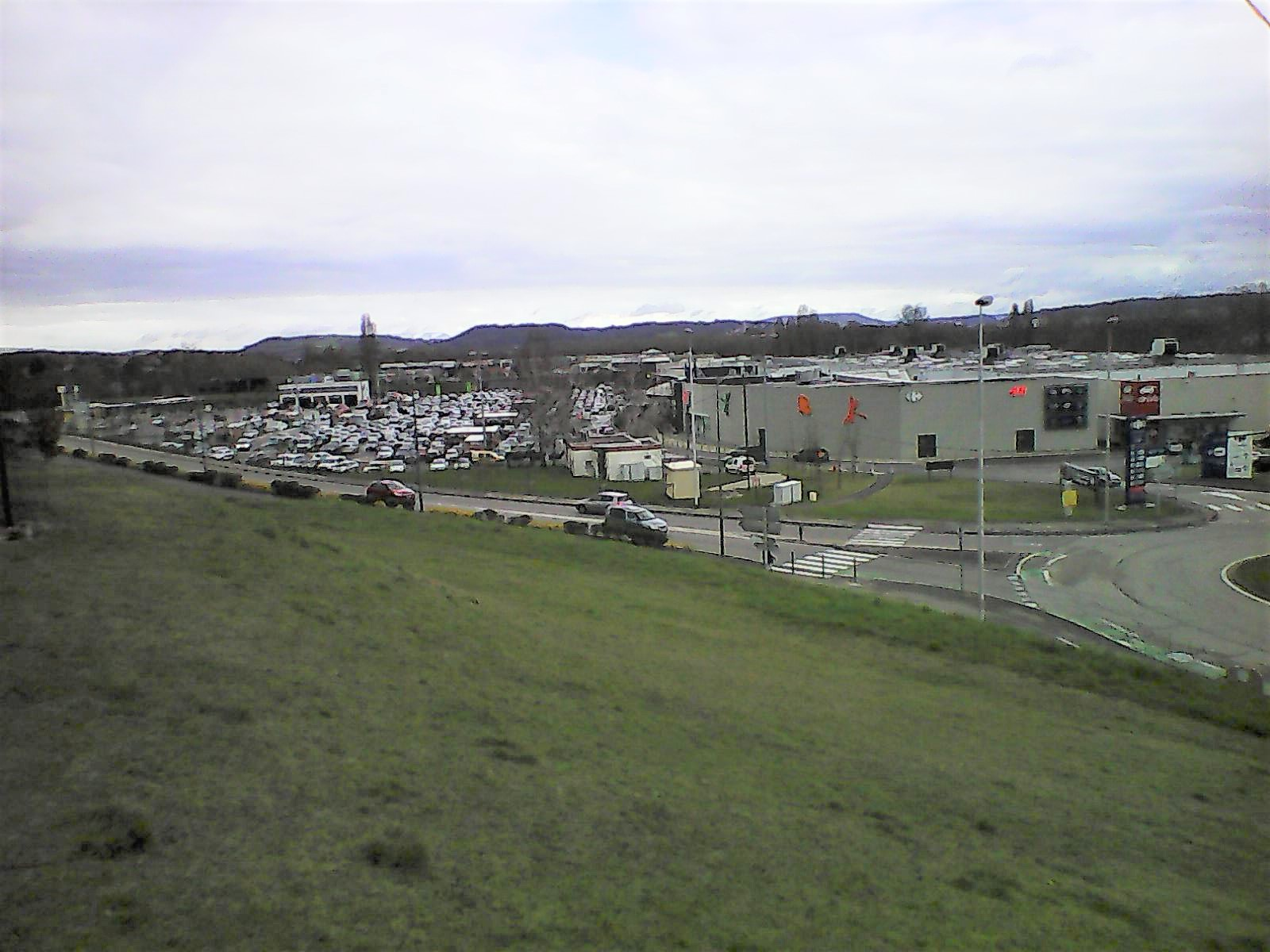 CC les Sayes à L'isle d'Abeau en mars 2019